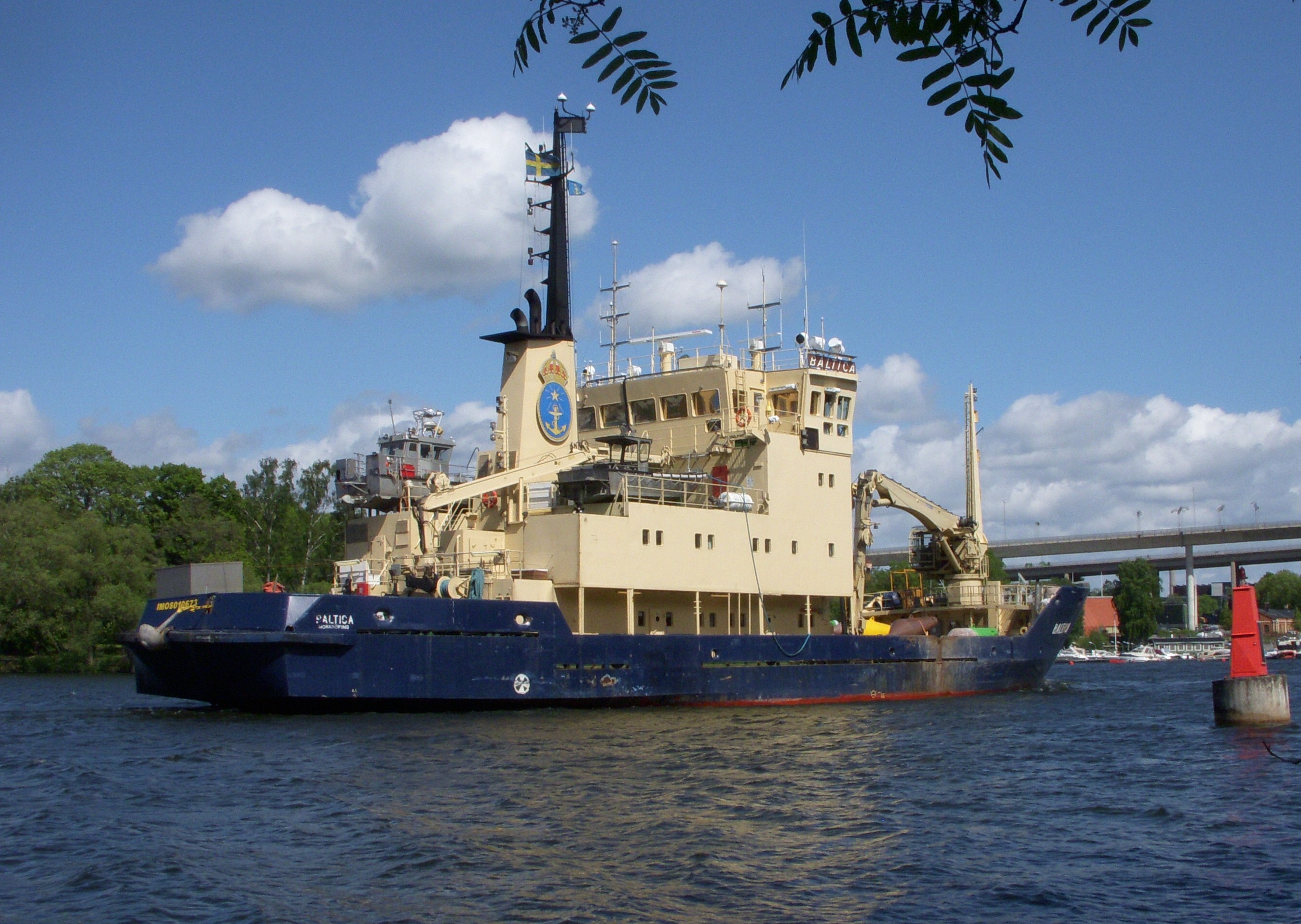 M/S Baltica (1982), Sjöfartsverkets arbetsfartyg på Årstaviken i Stockholm